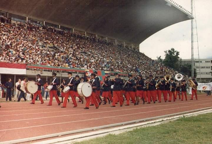 CS Marítimo de Venezuela en el Olímpico de la UCV, Caracas, Venezuela, 1986.